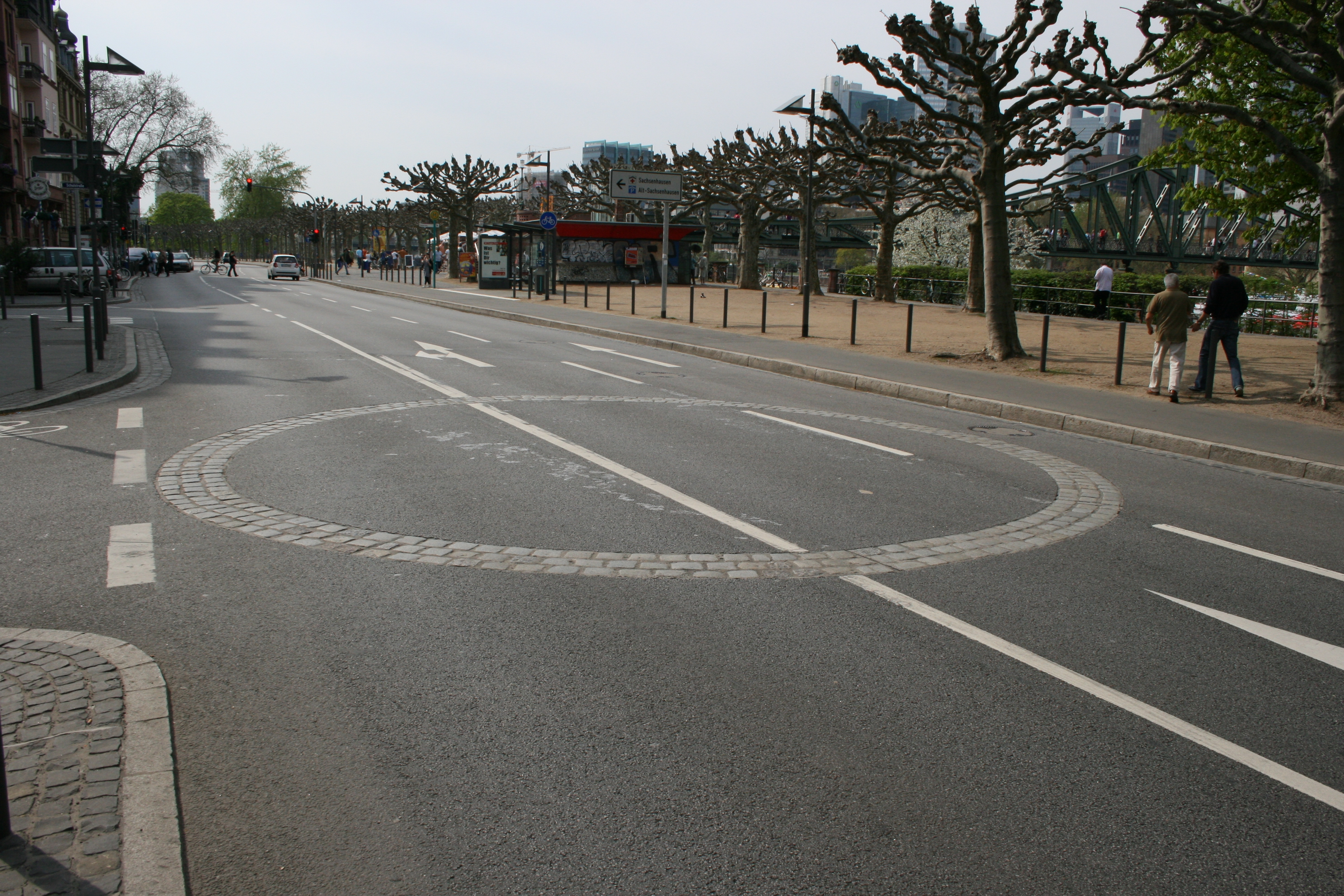 Mit Pflastersteinen markierte Lage des Ulrichsteins, späteres Schaumaintor und Teil der Stadtbefestigung von Frankfurt a.M.